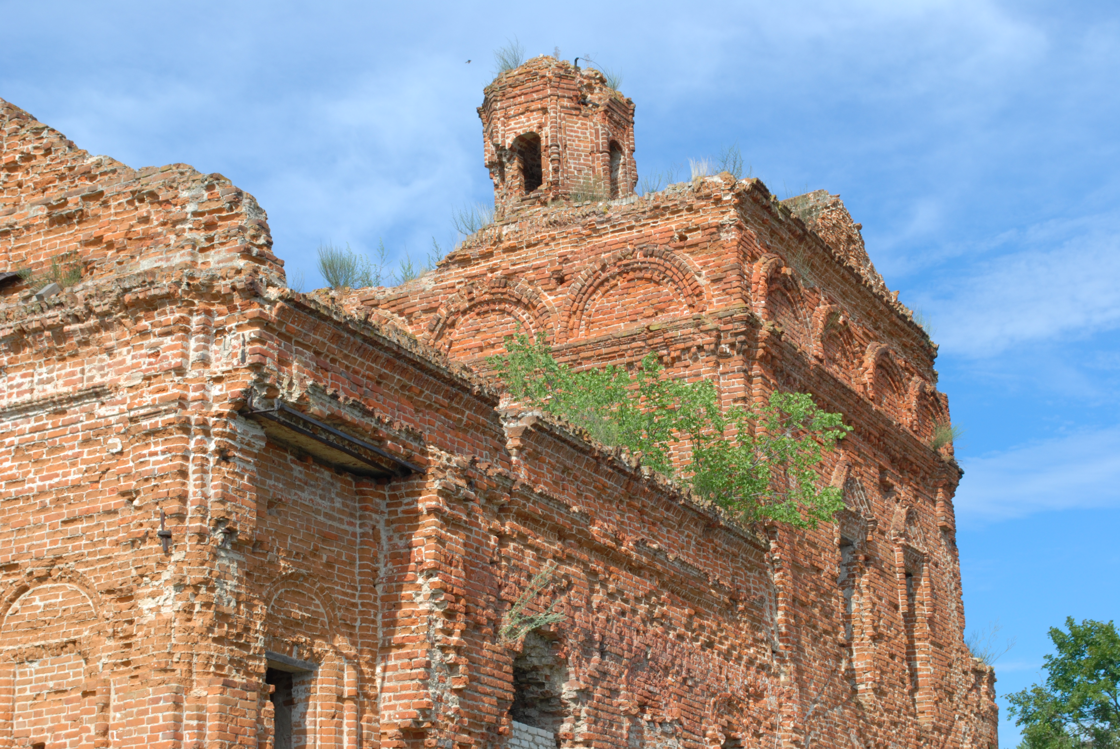 Спасо-преображенский собор (Брянская область, Севск, город Севск)